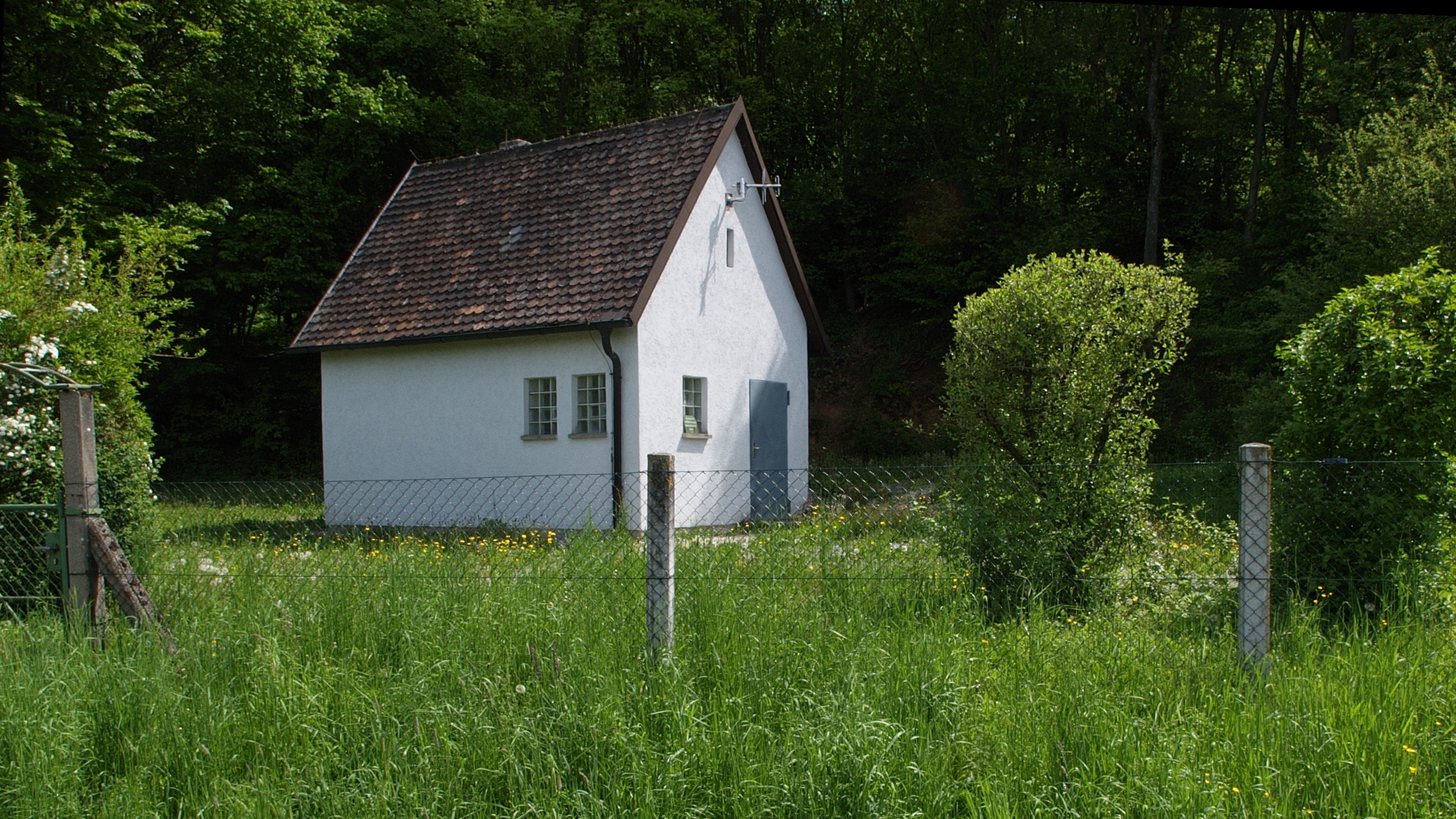 Wasserzweckverband Buchberggruppe Altes Wasserwerk am Buchberg